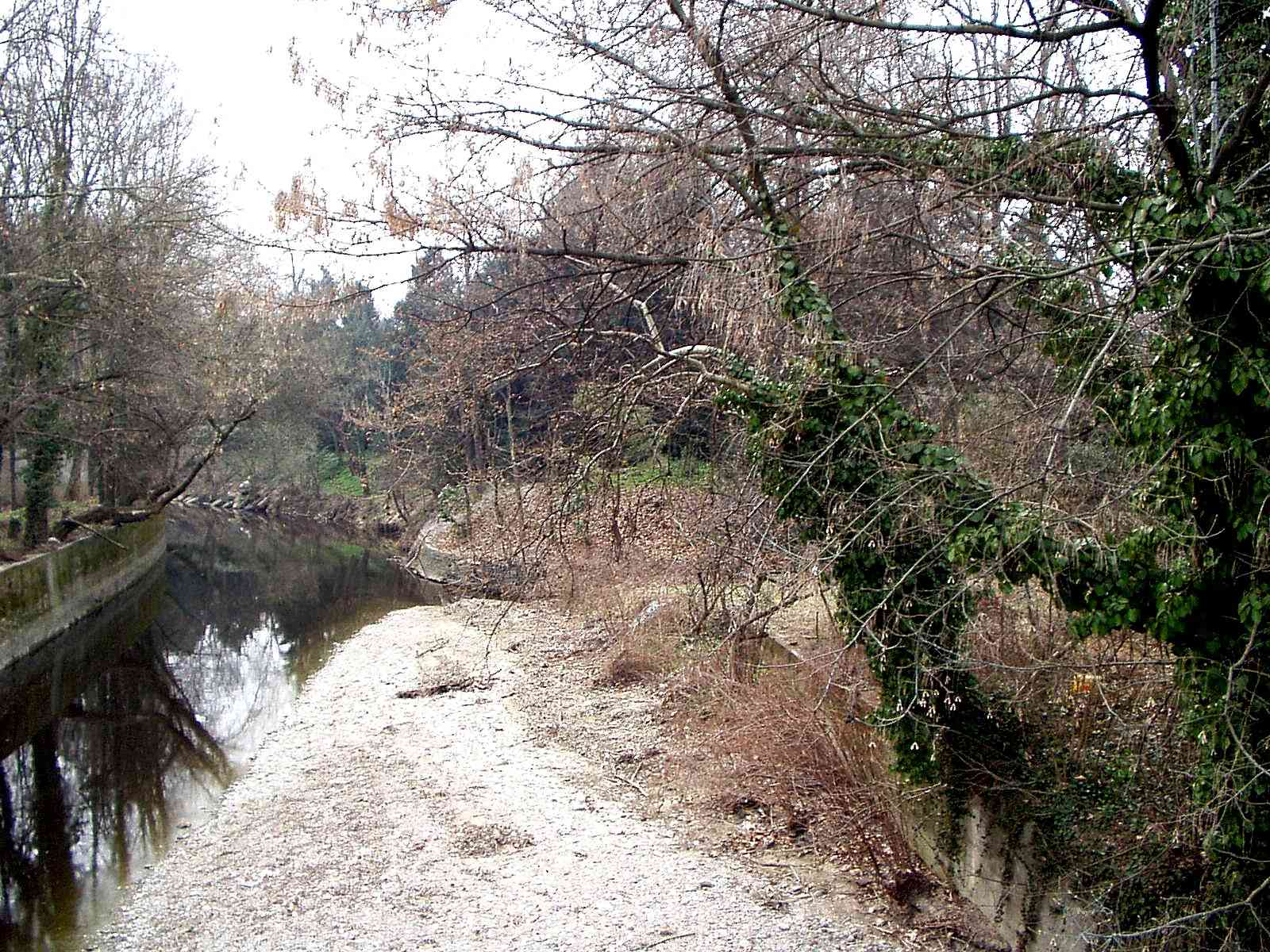 Monza vista invernale del Lambro dal ponte di via Boccaccio via Cantore